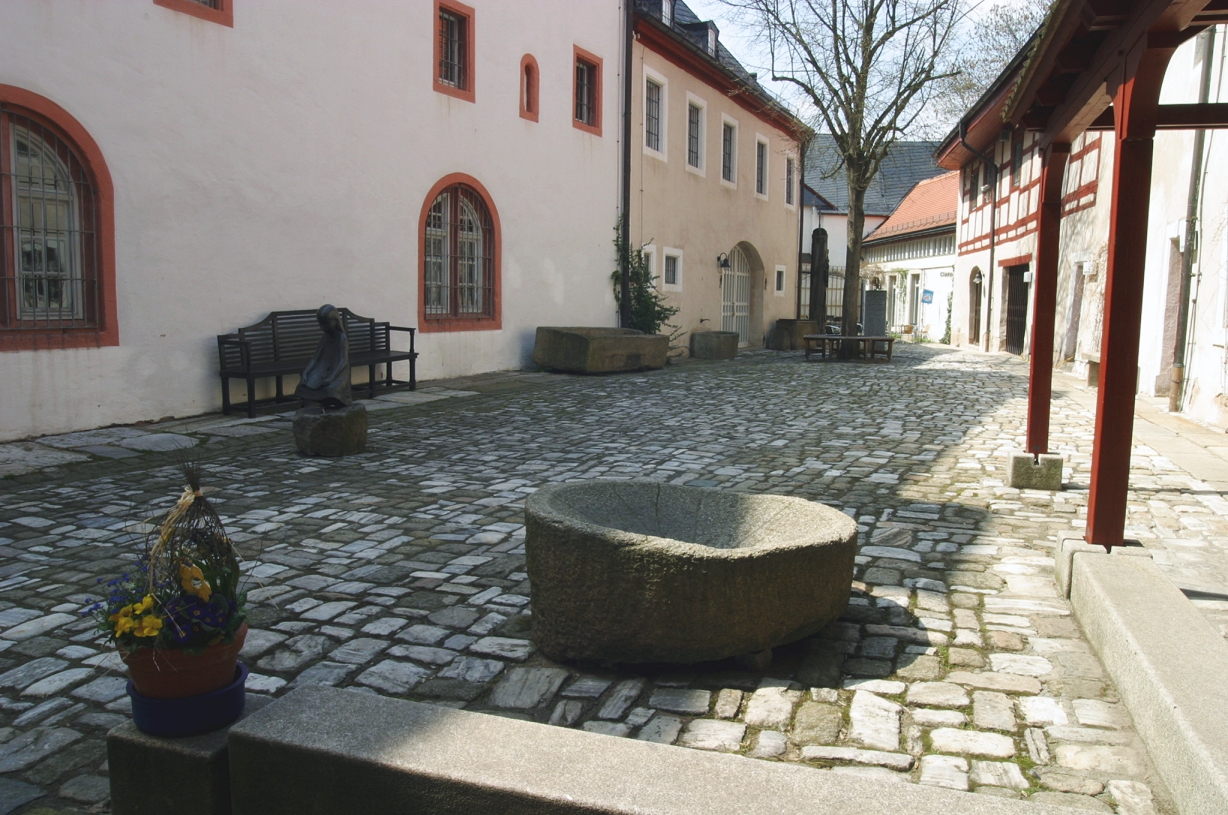 Museumsinnenhof, Dauerausstellung Fichtelgebirgsmuseum, Fichtelgebirgsmuseum 2004